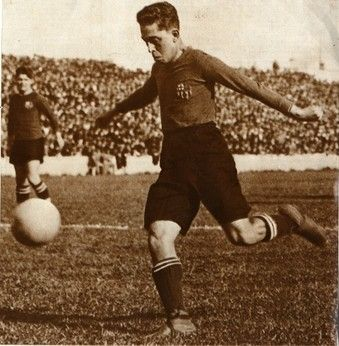 Paulino Alcántara, az FC Barcelona legendás csatára